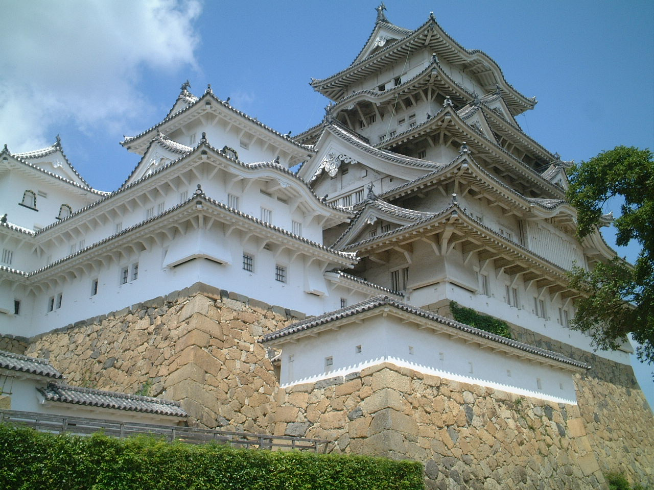 天守閣を仰ぐ